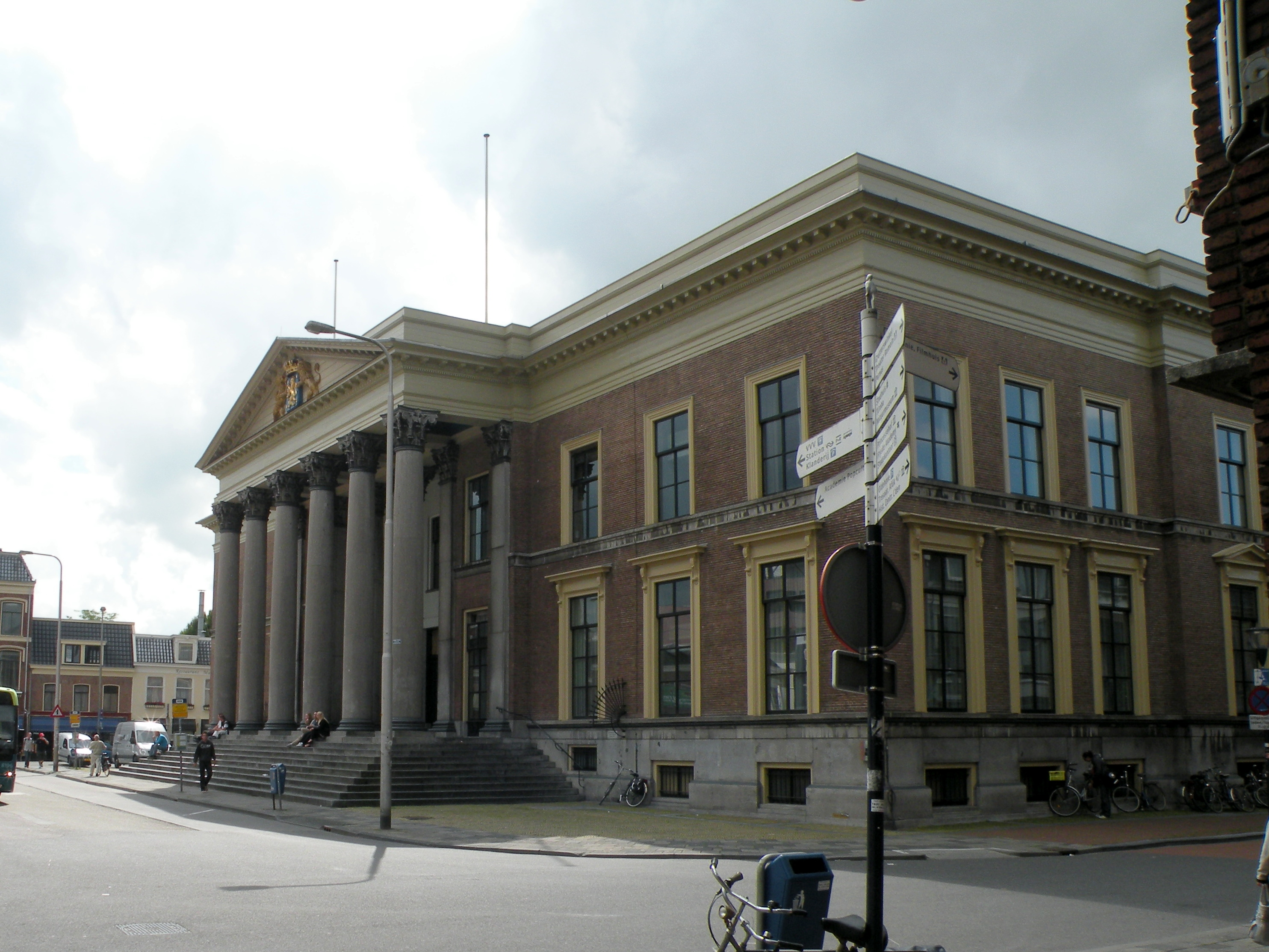 RM 24463, Paleis van Justitie, Leeuwarden